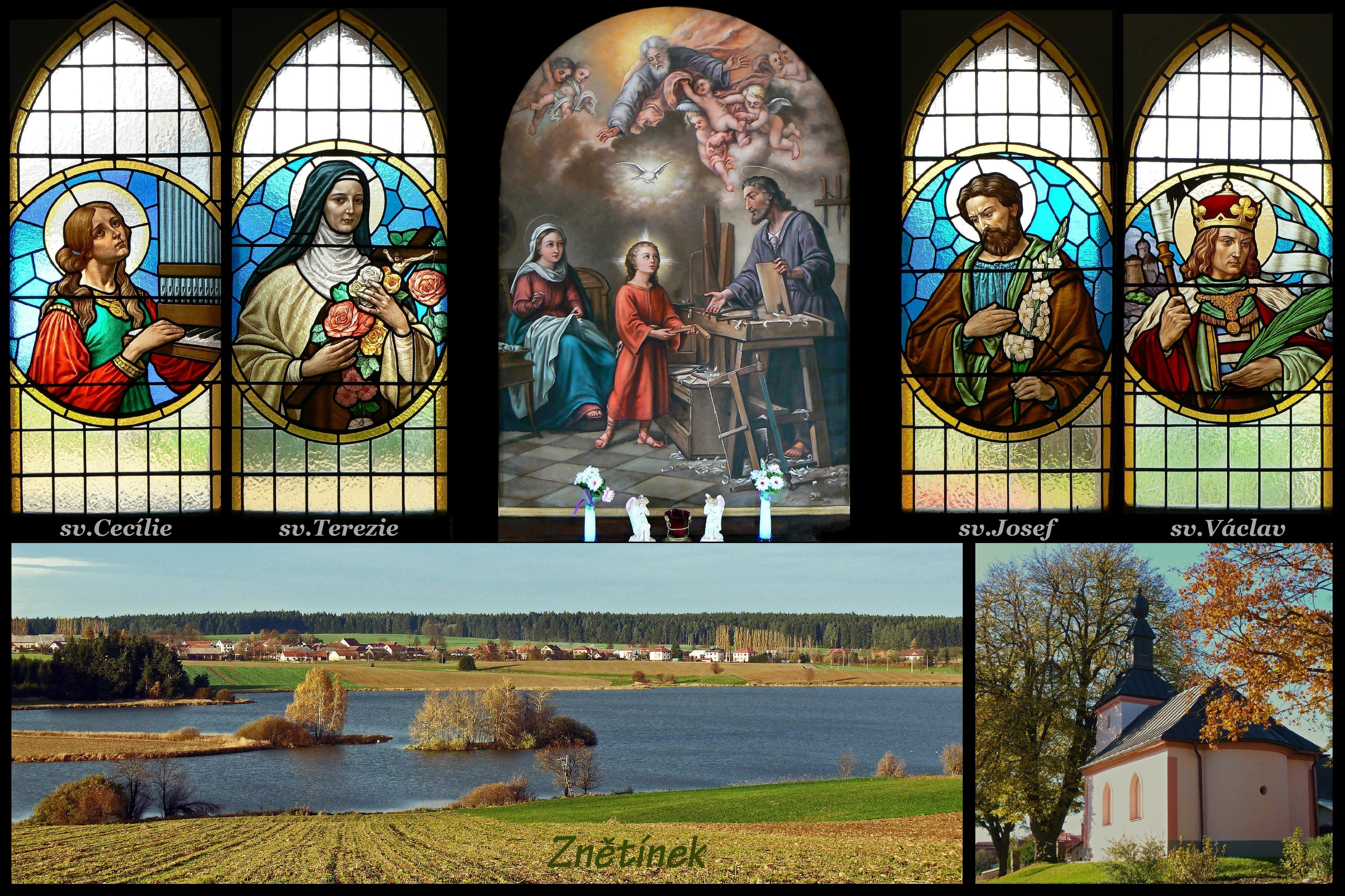 Na koláži je pohled na kapli sv. Josefa a detail na vitráže. Součástí koláže je i celkový pohled na Znětínek.